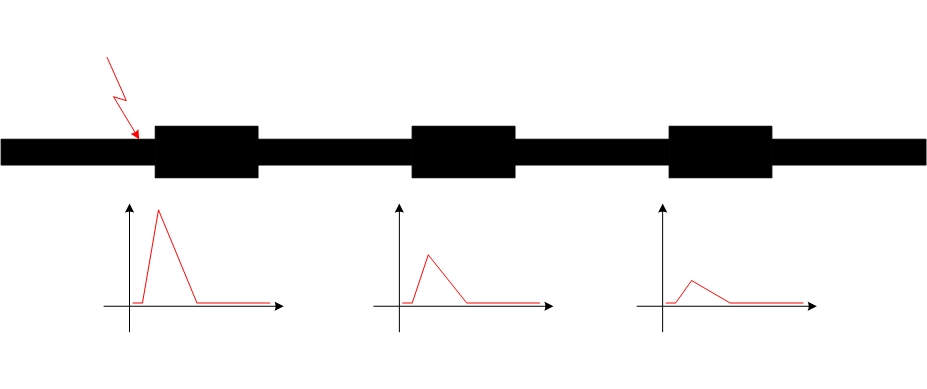 Dämpfung von Teilentladungsimpulsen auf einer Leitung abhängig vom Messort